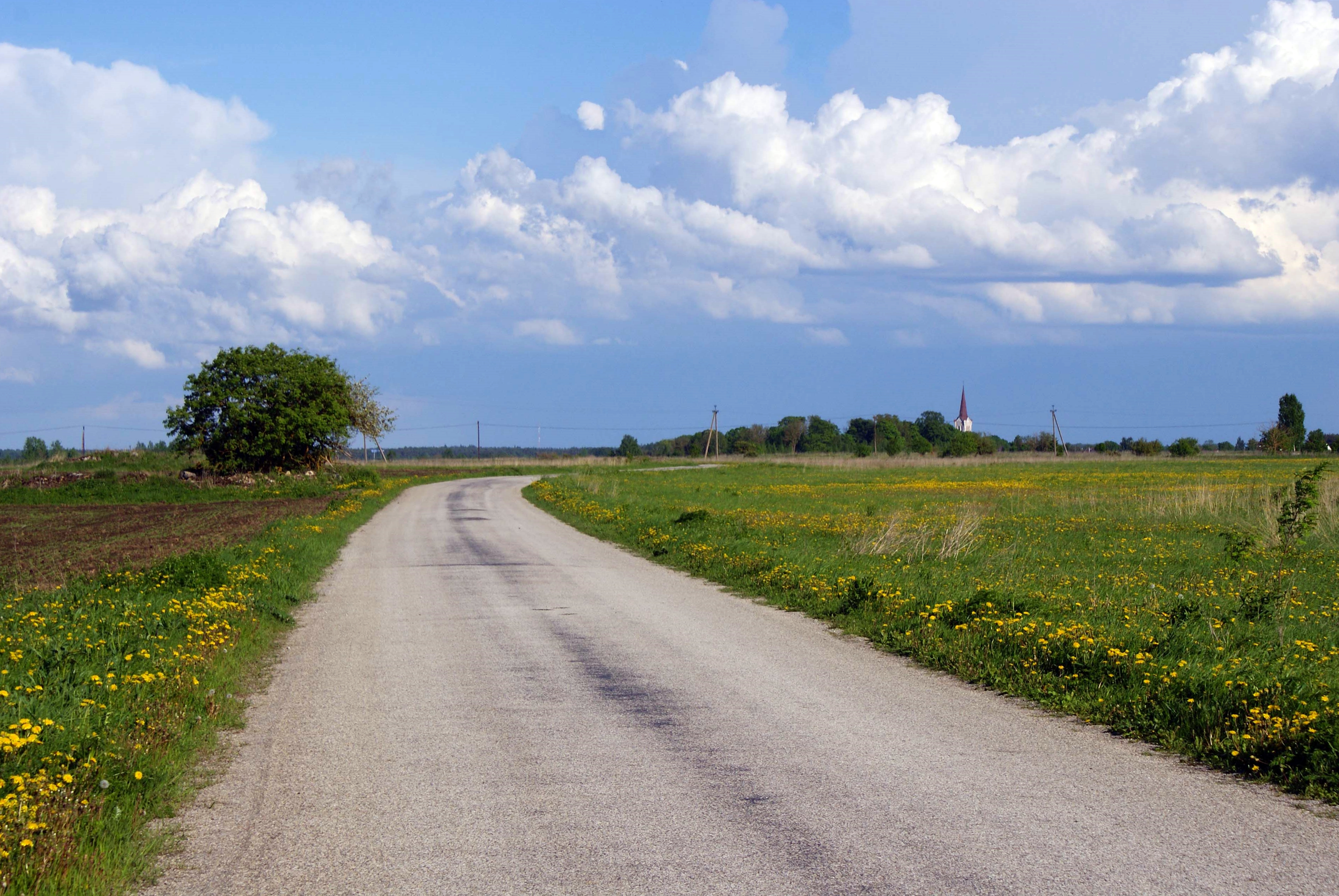 Rebala tee, Rebala